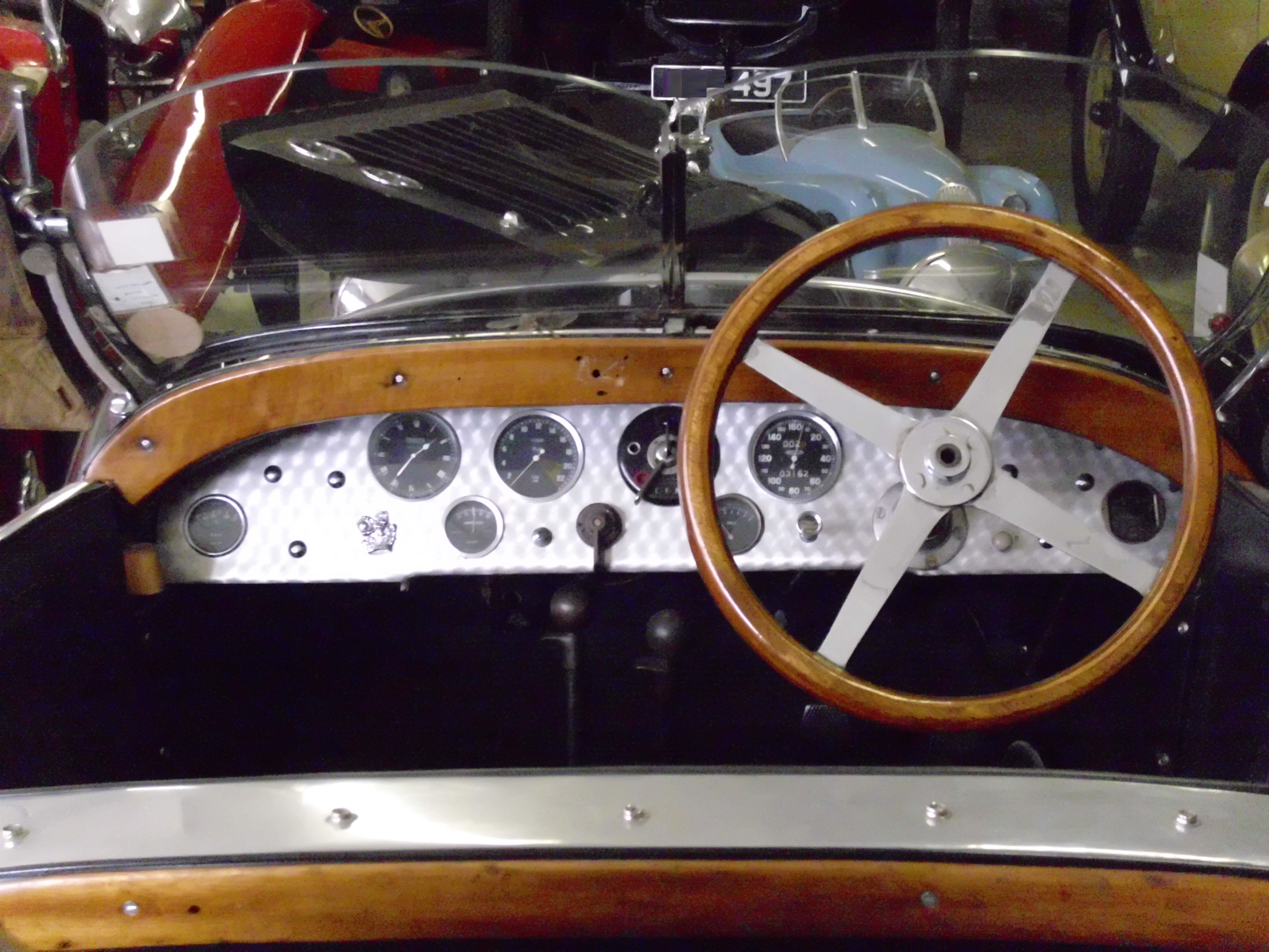 Génestin 1928 Interieur